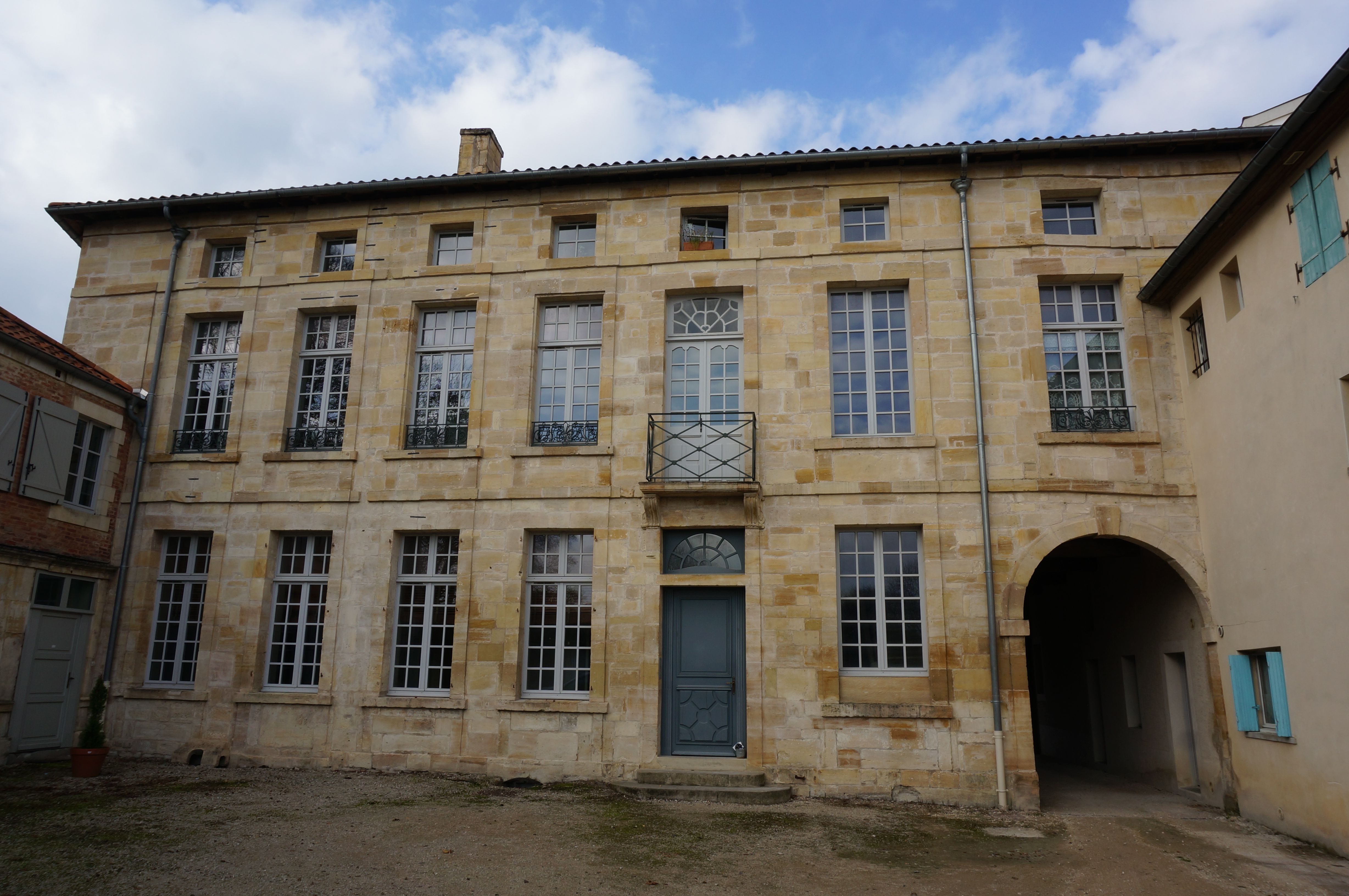 Hôtel de Salm (Bar-le-Duc), surcour.